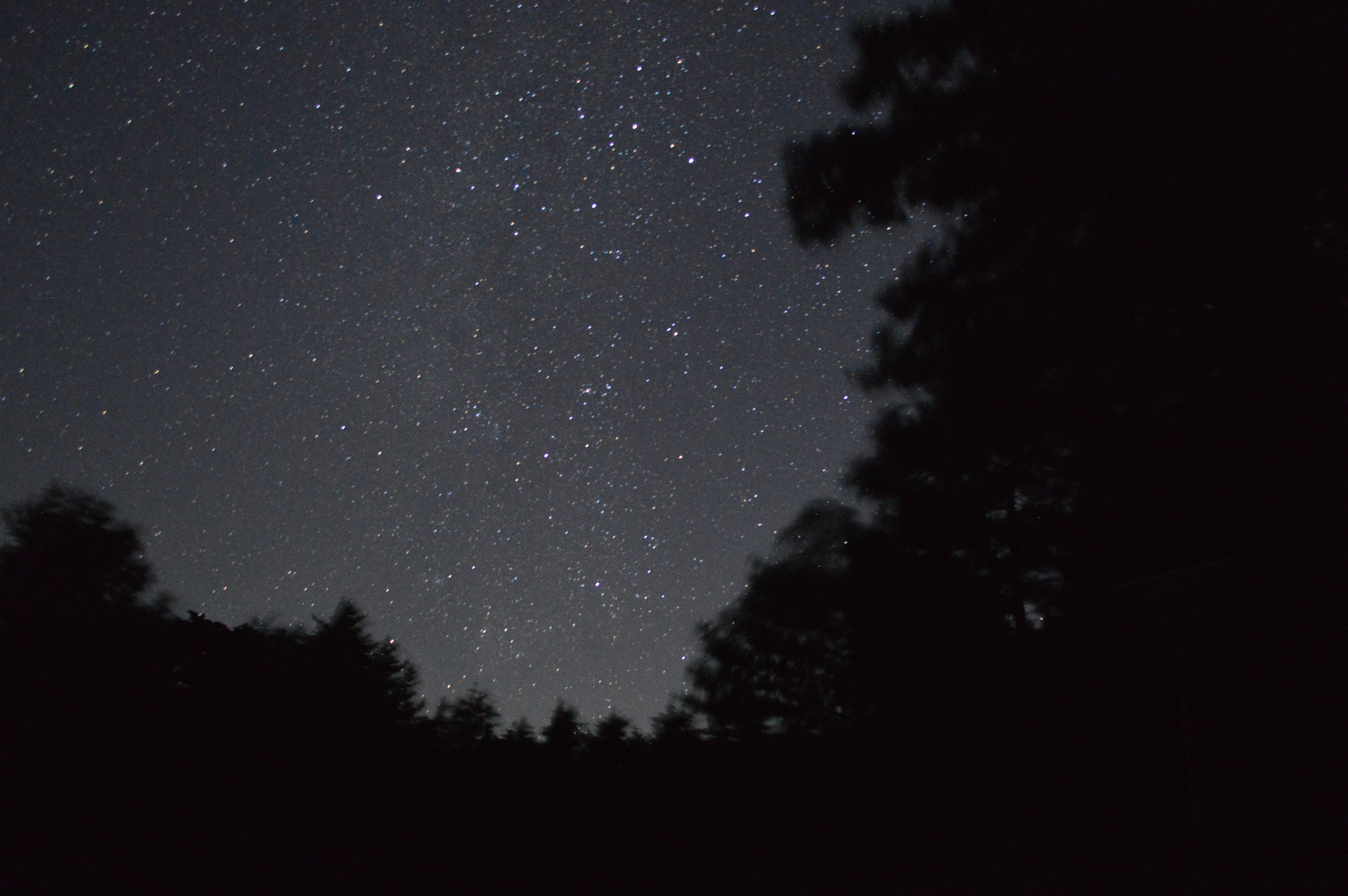 Estrellas vista desde Parque Montecristo